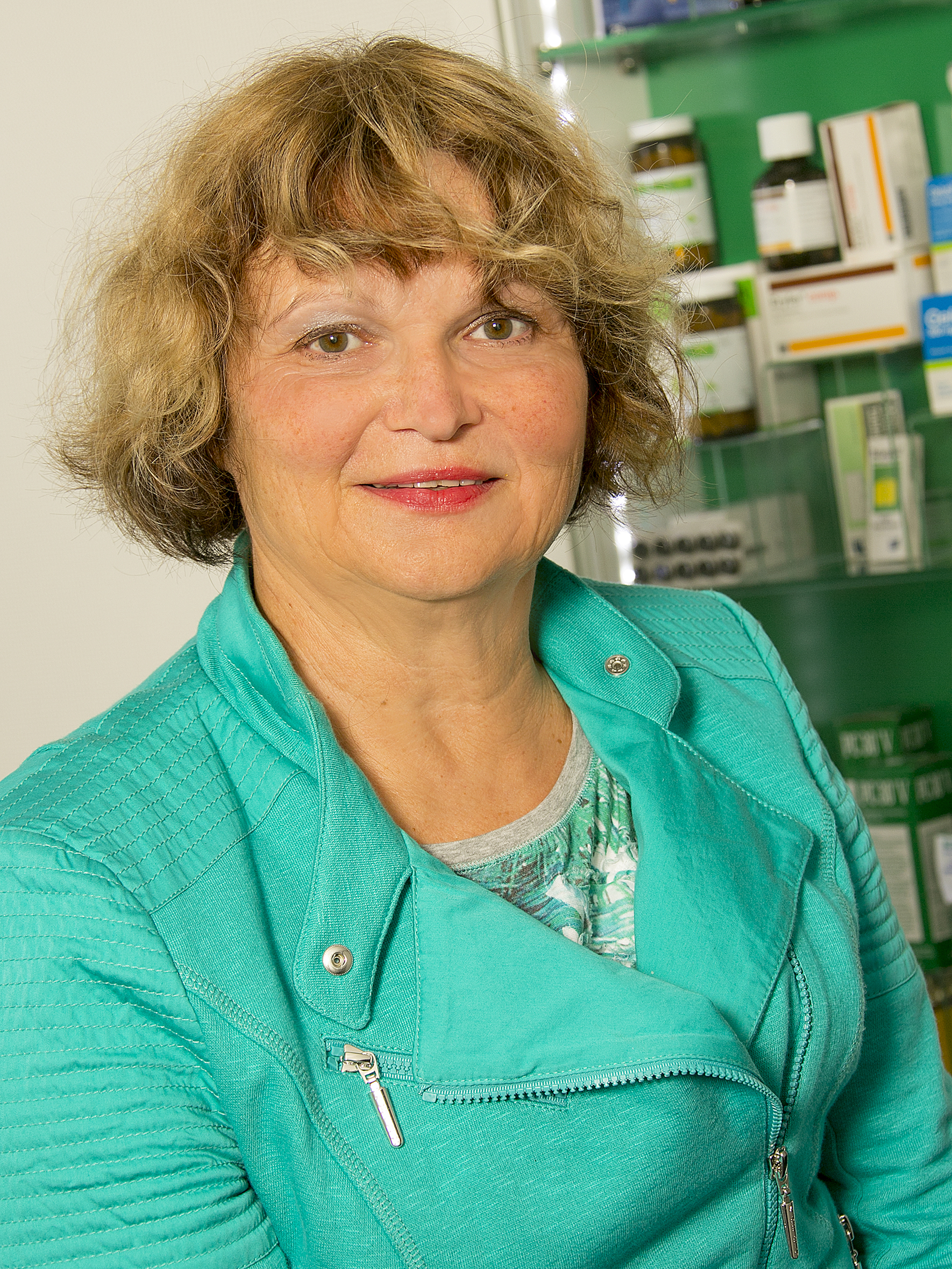 Prof. Dr. Dagmar Braun